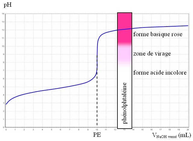 exemple de dosage d'un acide faible (acide acétique 0,1 M par une base forte (soude 0,1 M). courbe de l'évolution du pH en fonction du volume de base versé. équivalence repérée par la phénolphtaléine